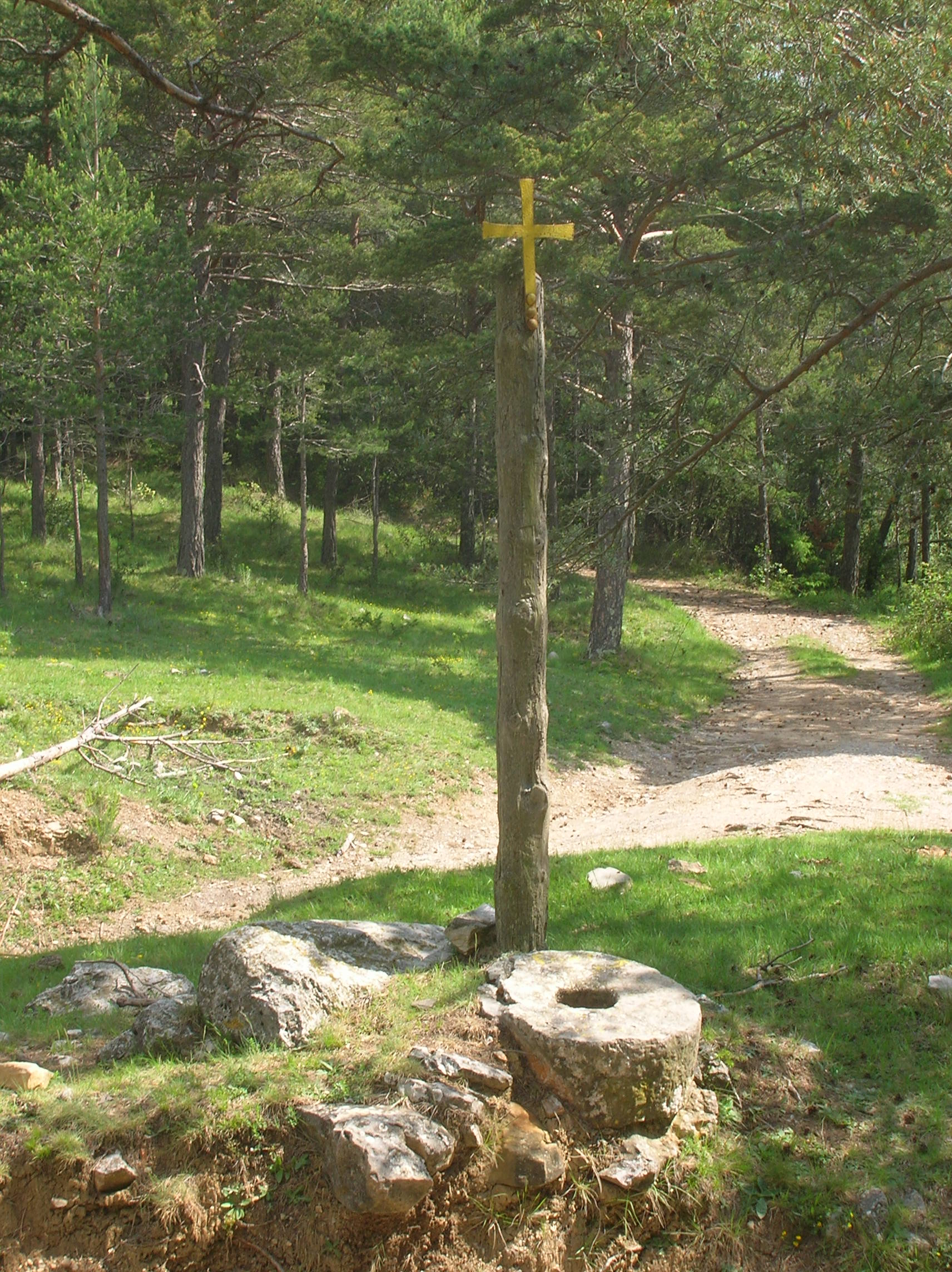 Creu de Faja